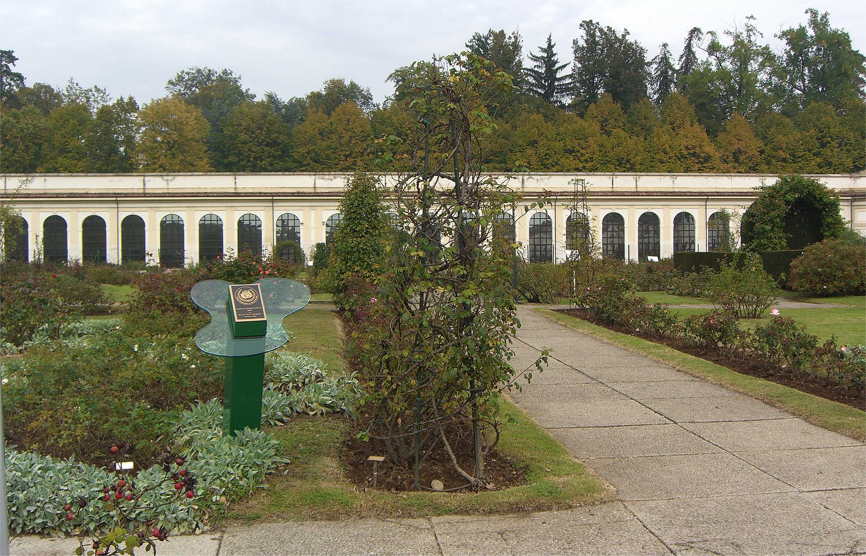 MB Monza Villa Reale il Serrone visto dal roseto Niso Fumagalli